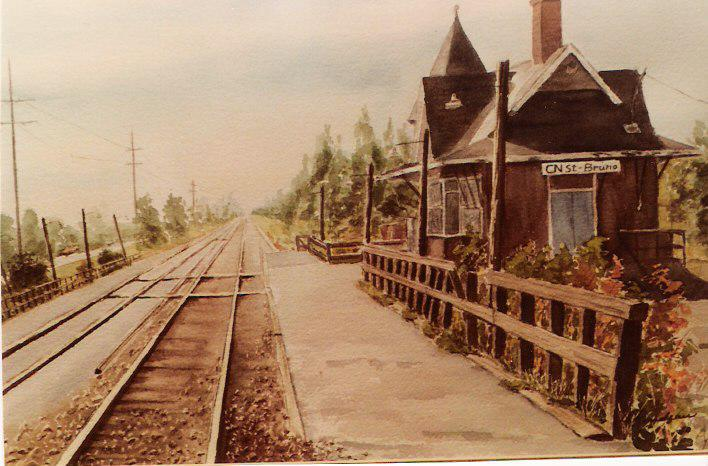 La gare de Saint-Bruno-de-Montarvillelabel QS:Lfr,"La gare de Saint-Bruno-de-Montarville"